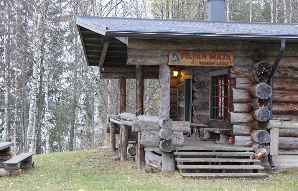 Suomen ladun paikallisyhdistys Puijon Ladun ylläpitämä Pilpan maja sijaitsee Kuopion Kolmisopen kaupunginosassa Kallaveden Pilpanlahden rannalla.